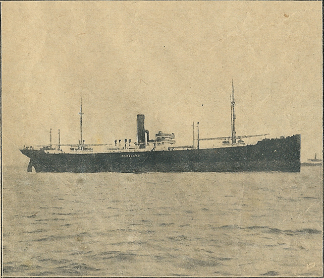 Damperen "Maryland" fra "De forenede" i 1914. Den var sejlet fra Buenos Aires med majs til England, da den stødte på en mine 21. august samme år 35 kvartmil fra Galopernes fyrskib.